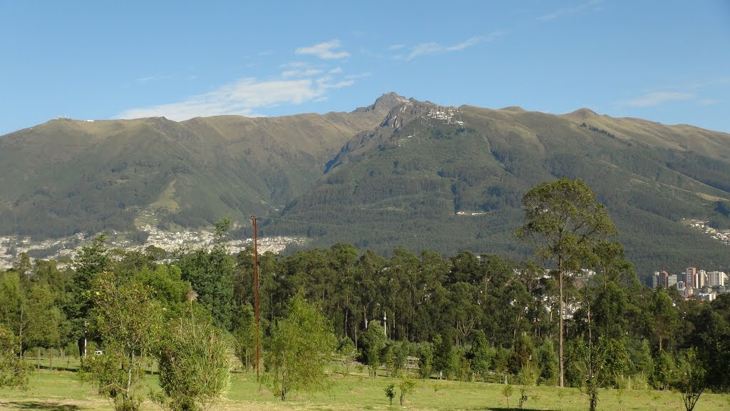 Volcán Rucu Pichincha, Quito, Ecuador